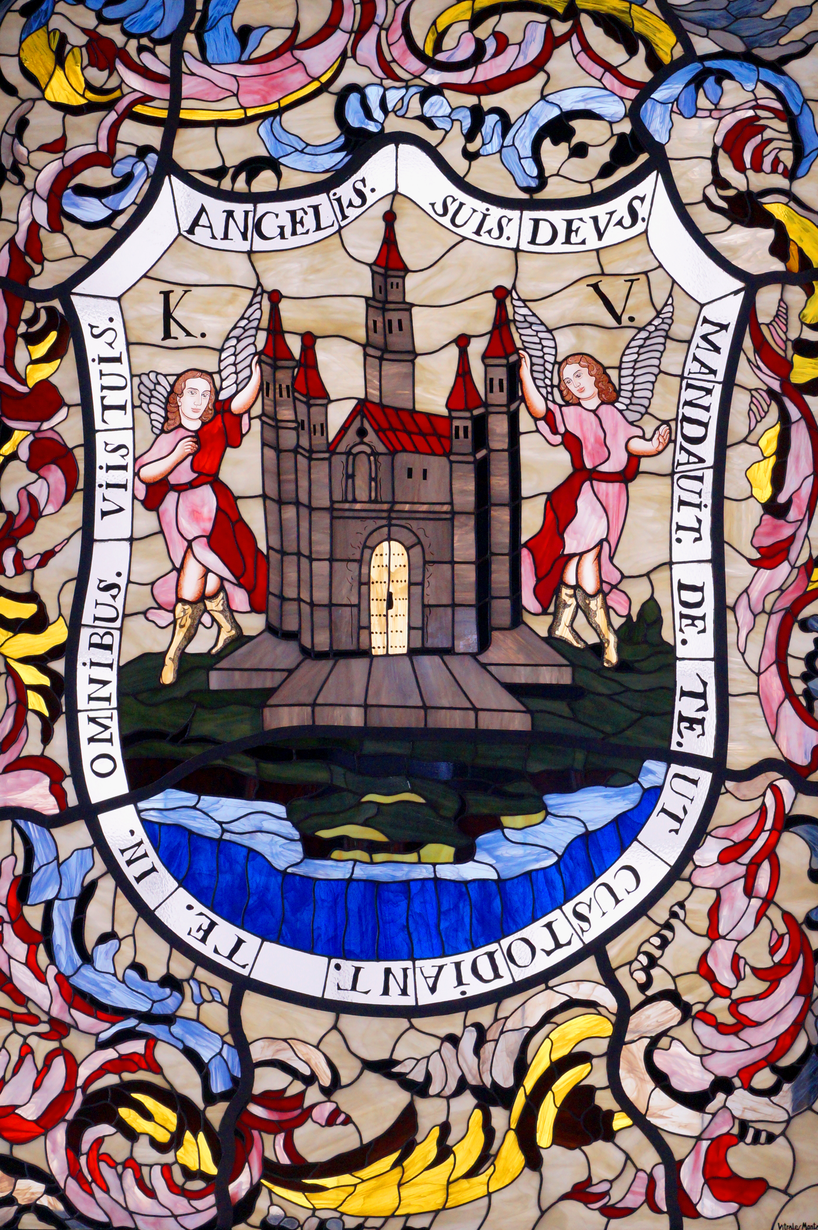 Escudo de Puebla ubicado en vitral del Museo Internacional del Barroco (Puebla, México).